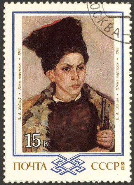 Беларуская (тарашкевіца): Паштовая марка СССР. Яўген Зайцаў «Юны партызан» (1943)